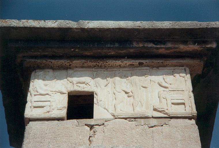 Granatäpfel und Blüten werden als Weihegaben gereicht: Szene des Reliefs auf dem sog. Harpyienmonument, einem Pfeilergrab, dass in dieser Form in Lykien einzigartig ist. Die Reliefplatten sind Kopien der Originale, die in London aufbewahrt werden. Fotograf: Alexander Buschorn (1990)